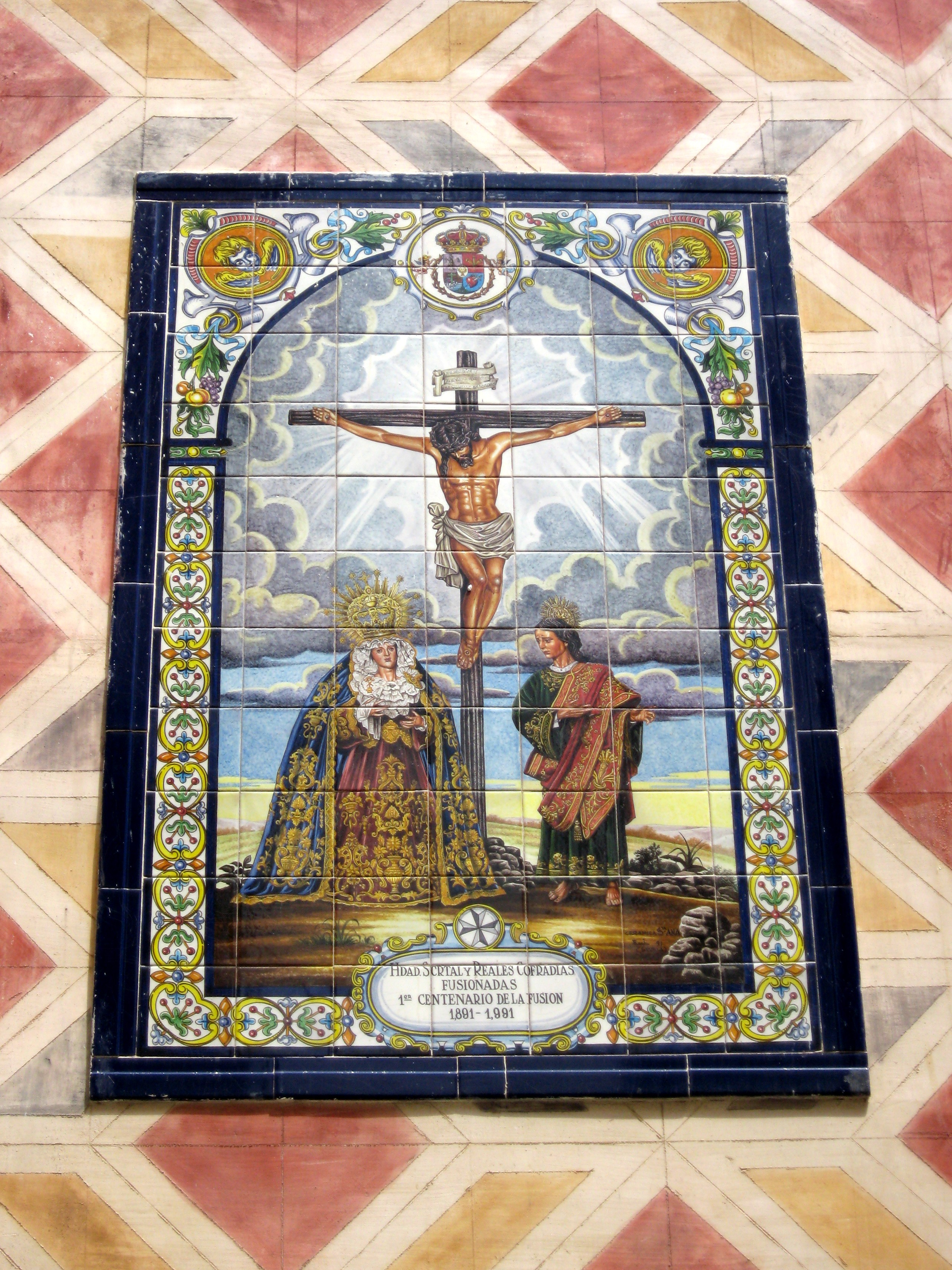 Mural cerámico junto a la entrada lateral (frente al comienzo de la calle Carlderón de la Barca) de la iglesia de San Juan Bautista de Málaga en comemoración del primer centenario de la fusión de las Reales Cofradías Fusionadas que tienen en este templo su sede canónica